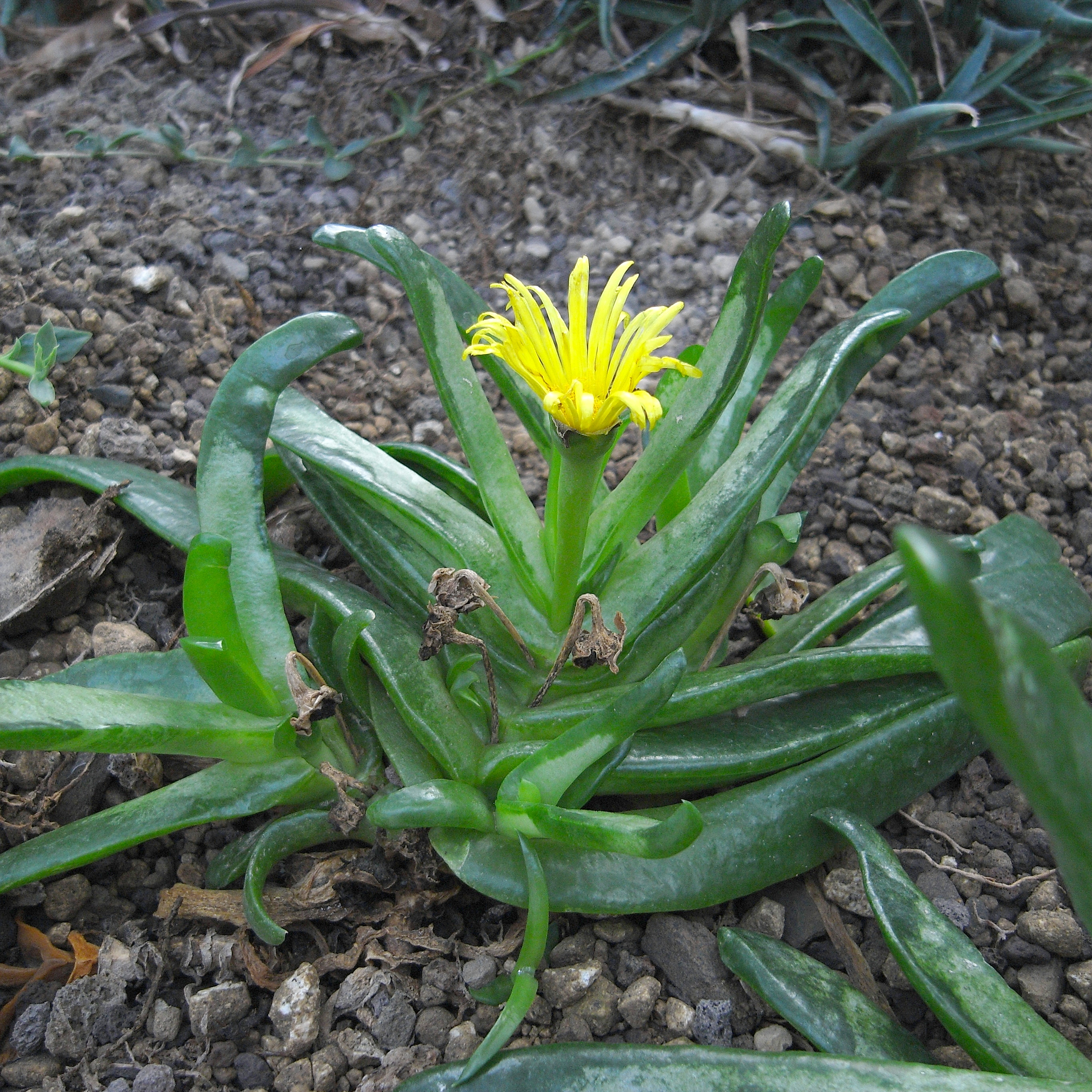 Glottiphyllum longum (syn. Glottiphyllum latum), Typo im Dateinamen